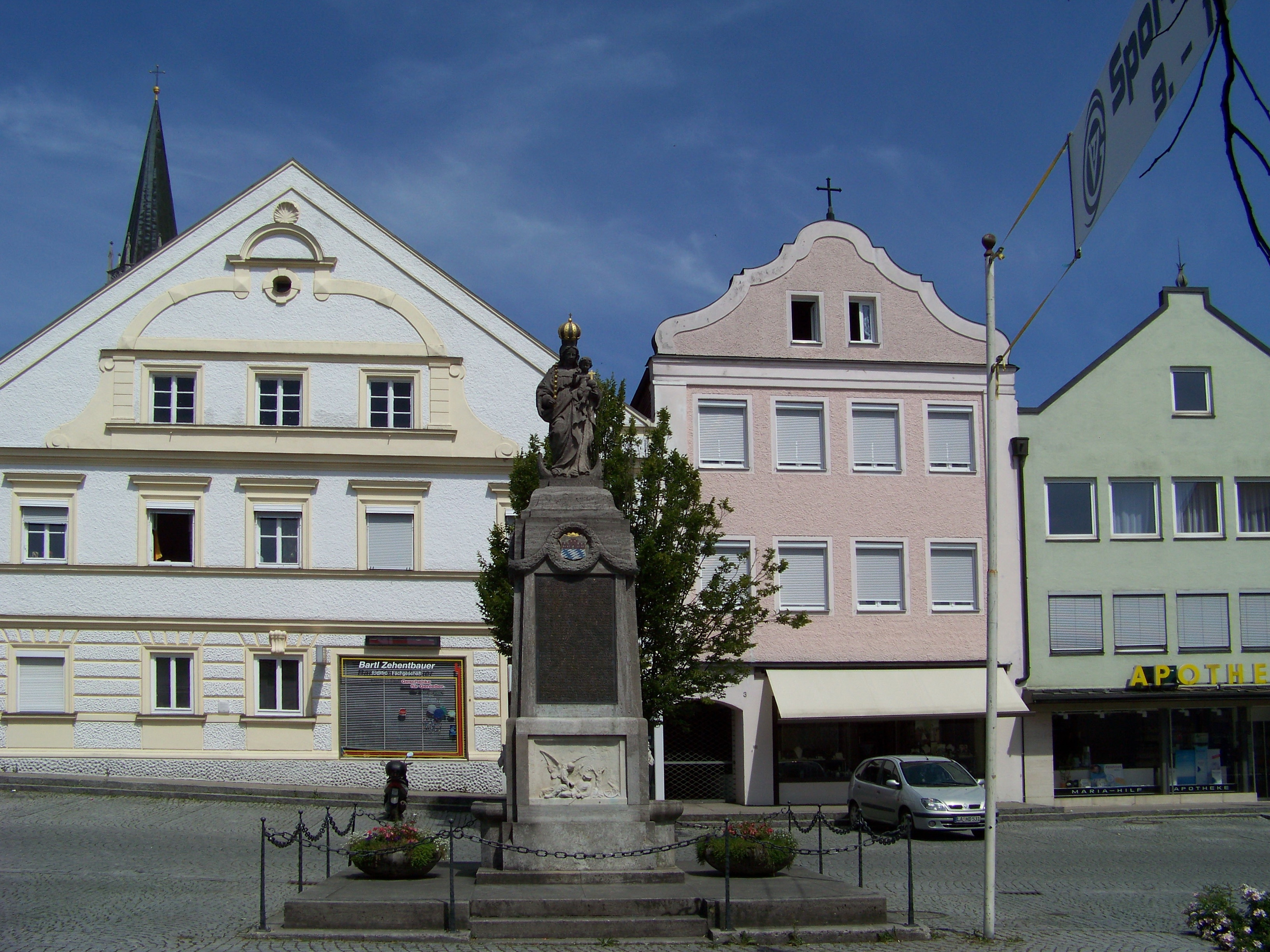 Geisenhausen, Marktplatz 2, Wohn- und Geschäftshaus. Giebelbau, Neurenaissance-Fassade, um 1890.